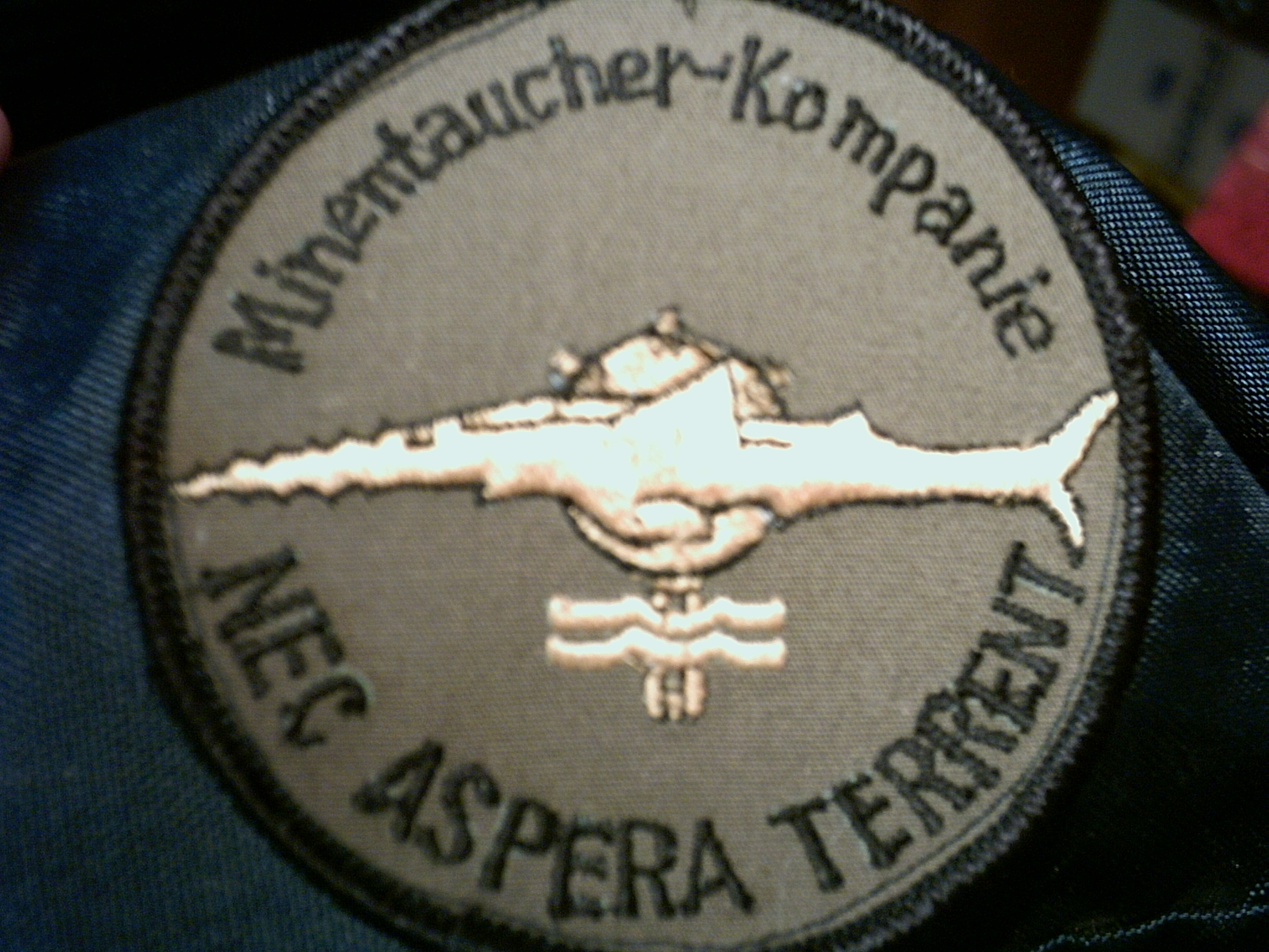 Abzeichen der Minentaucher, own work of Personaldisponent, Foto vom 02.06.06